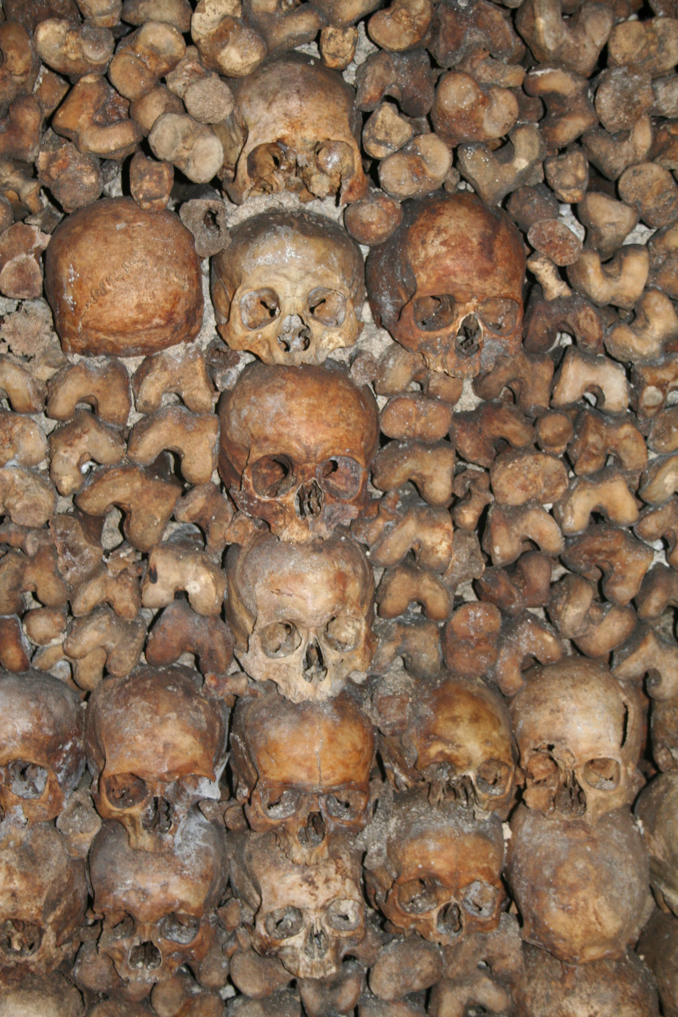 Kranier og knogler. Bemærk at kranierne er anbragt, så de danner korset.